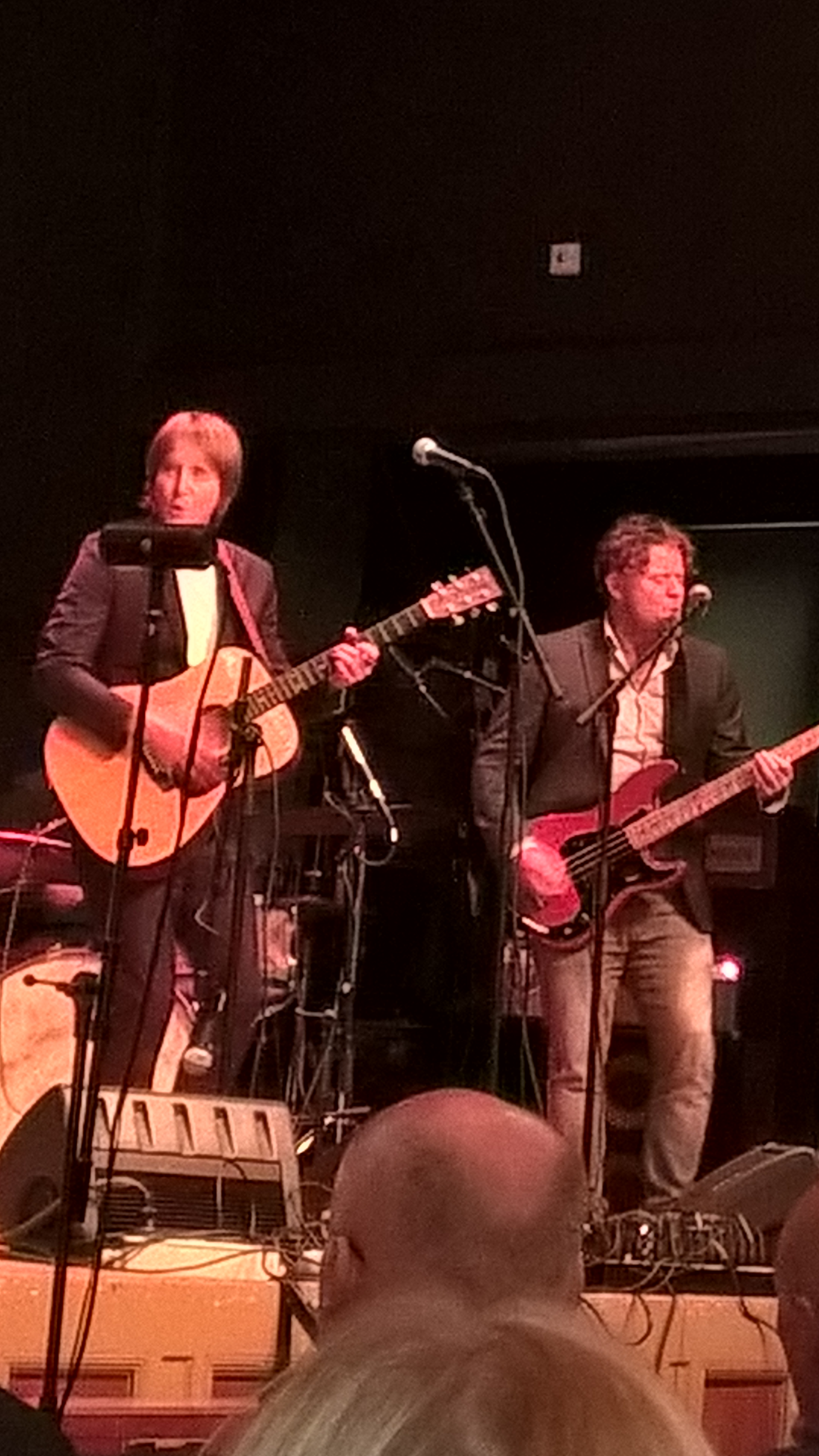 Bertolf